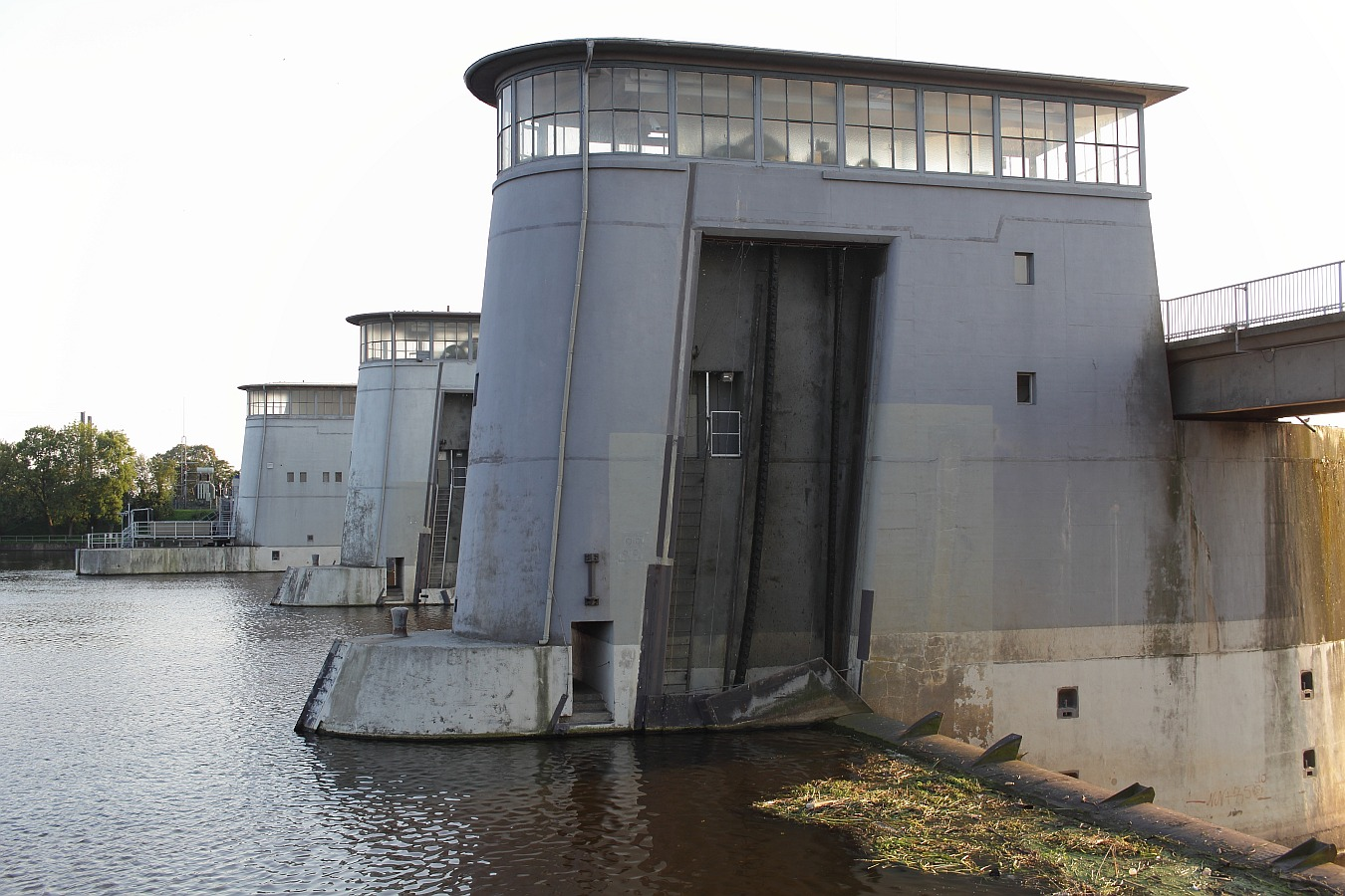 Staustufe Langwedel (Mittelweser). Blick auf einen Maschinenturm des Wehrs vom Oberwasser.